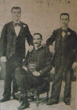 Георги Маринов, Димитър Гоголов, Ангел Лавчиев.